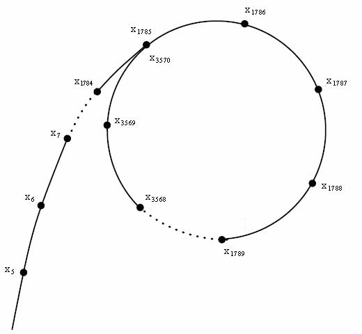 voorbeeld pollard rho cyckel